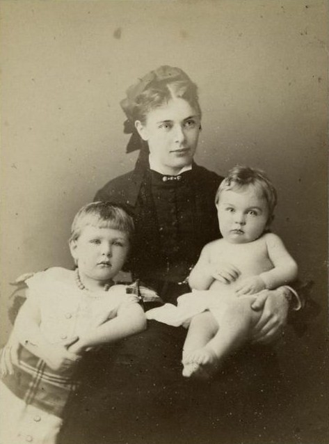 Светлейшая княгиня Наталья Федоровна Ливен (1842—1920; ур. графиня Пален) с сыновьями Анатолием (1872—1937) и Павлом (1874—1963).